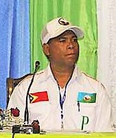 Longuinhos dos Santos auf dem ersten Nationalkongress der PLP